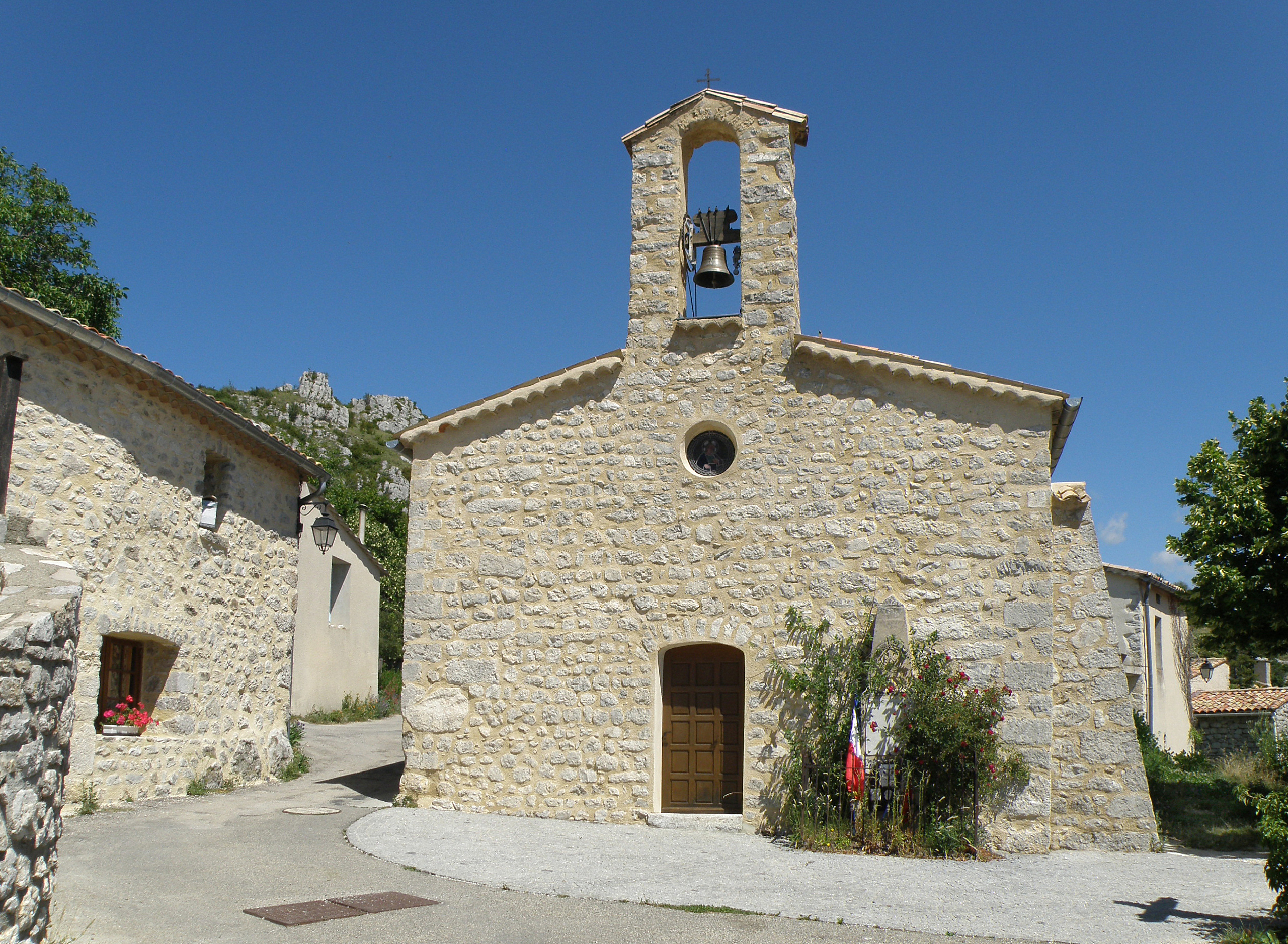 Le Poët-en-Percip (Drôme, France). Église Saint-Simon.